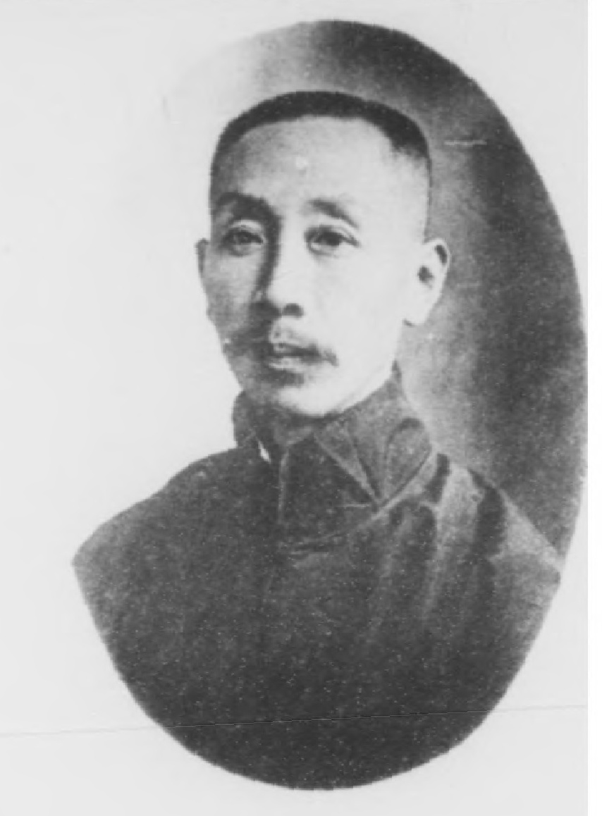 光緒甲辰科進士小像